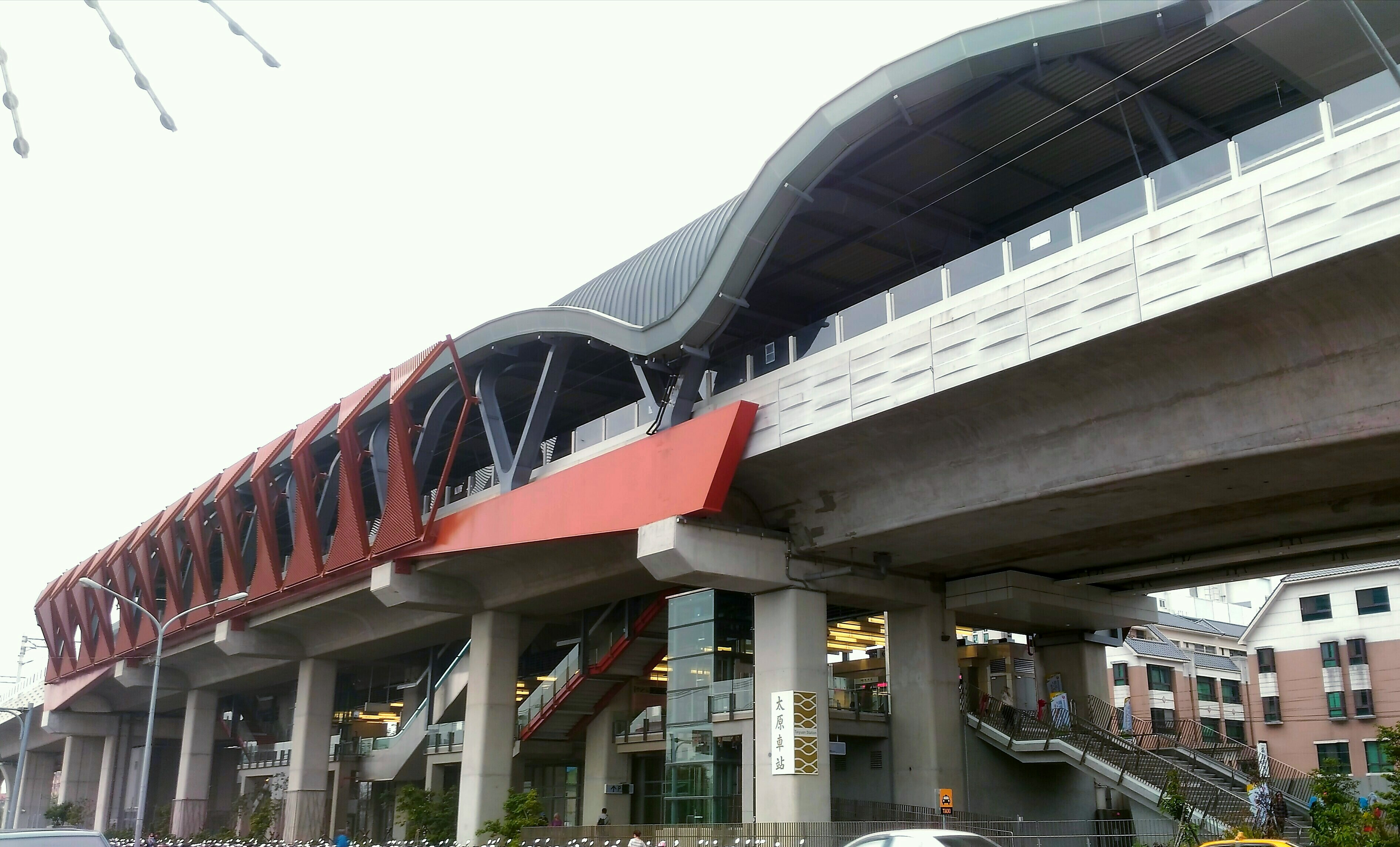 中文（台灣）: 太原車站(新高架車站)